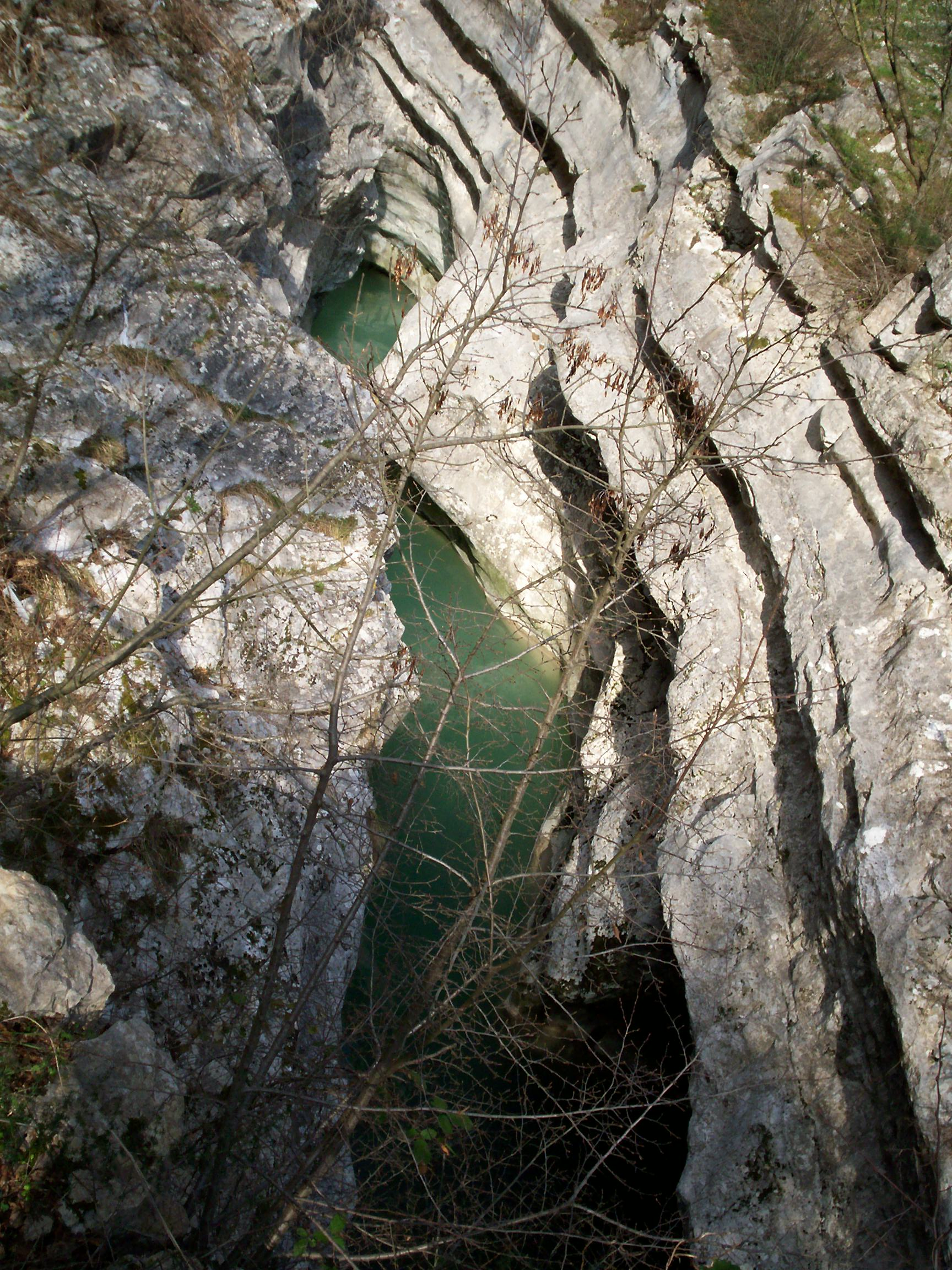 particolare delle Forre del fiume Titerno in Cerreto Sannita (Bn)